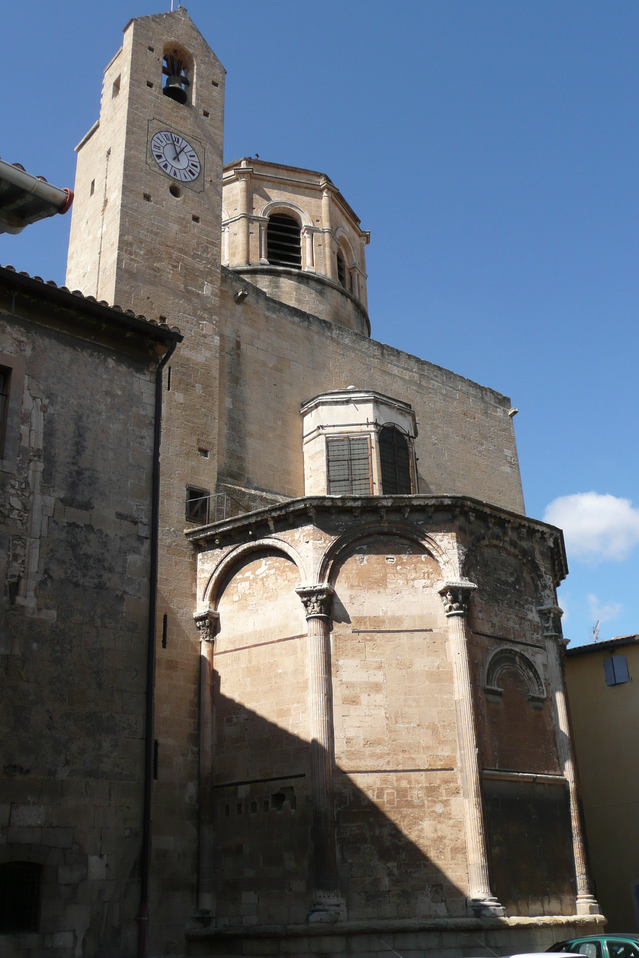 Cathèdrale Saint Véran à Cavaillon.